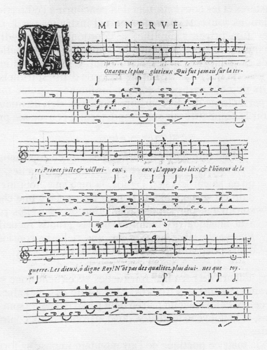 François (dit Tristan) L'Hermite (1601-1655) poète, Estienne Moulinié (1599-1676) compositeur - "Ballet de Mademoiselle", ou "Ballet des Quatre monarchies chrétiennes" (1635) Air : "Monarque le plus glorieux"